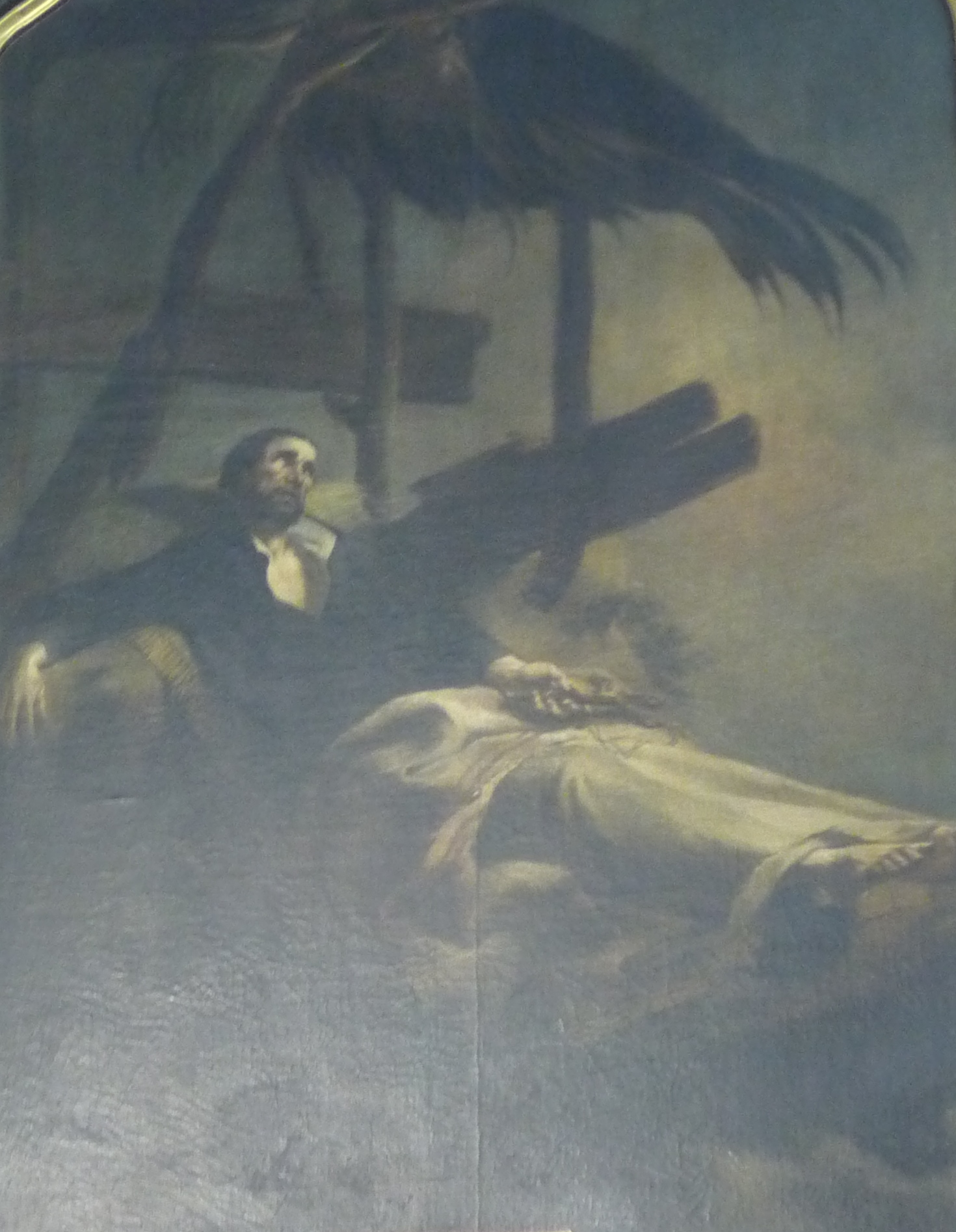 Obraz: Smrt svatého Xaveria, chrám sv. Mikuláše na Malé Straně, Praha